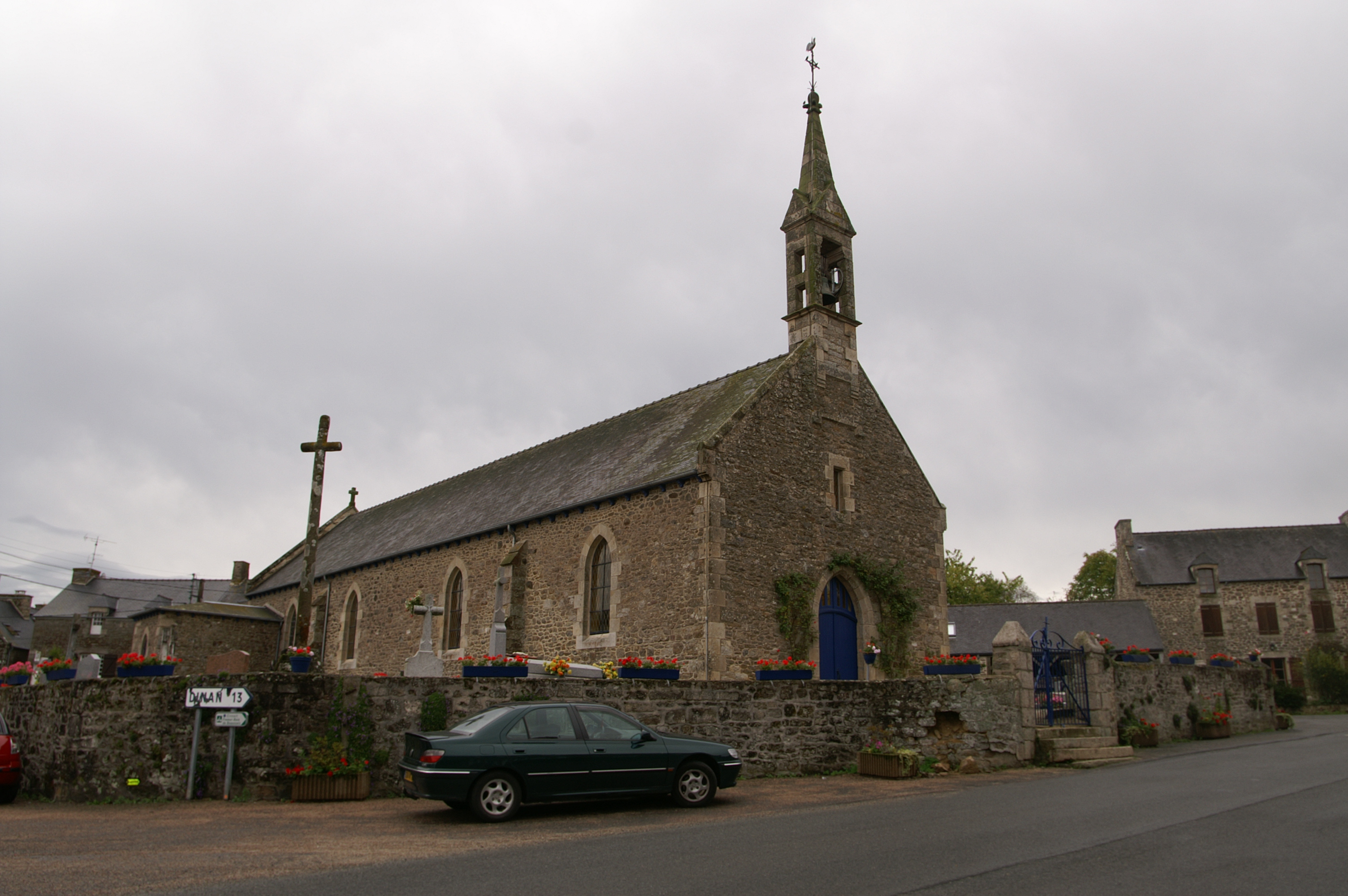 Église Saint-Pierre de Plessix-Balisson.